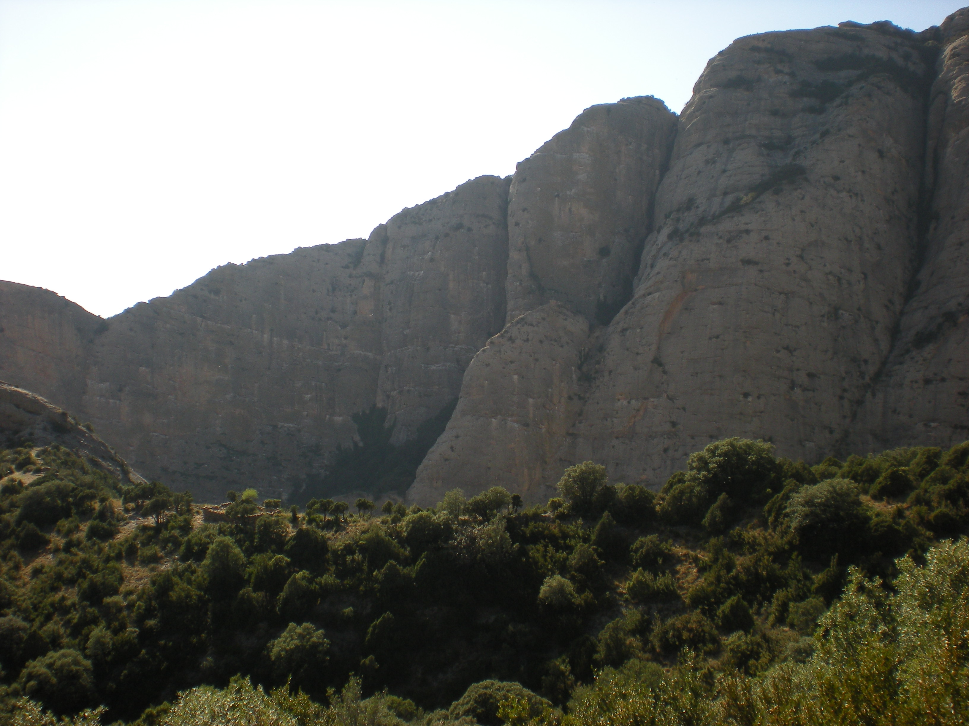 Vista desde el Collado de San Salvador